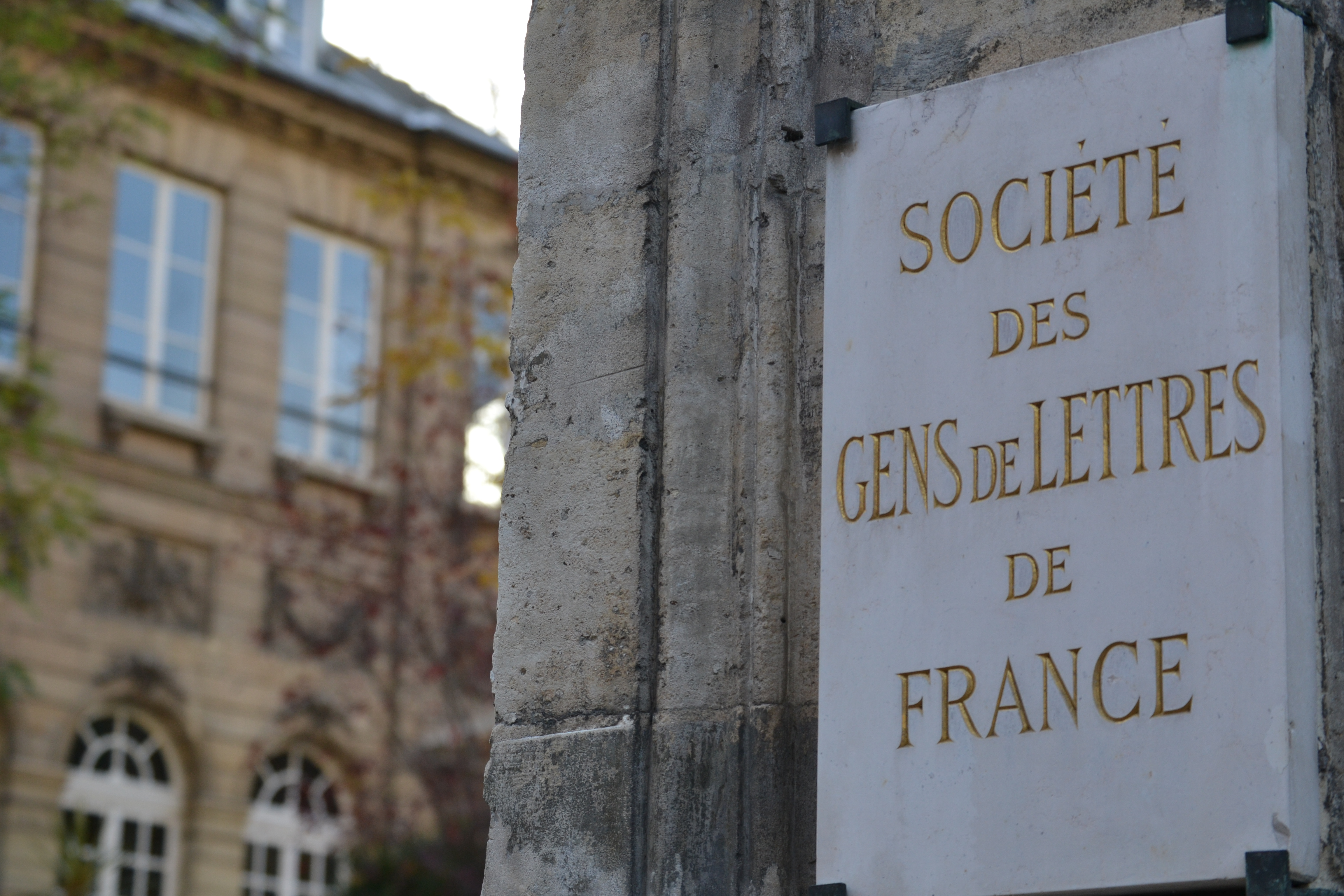 Inscription à l'entrée de la Société des gens de lettres de France, rue du Feaubourg Saint-Jacques, à paris.